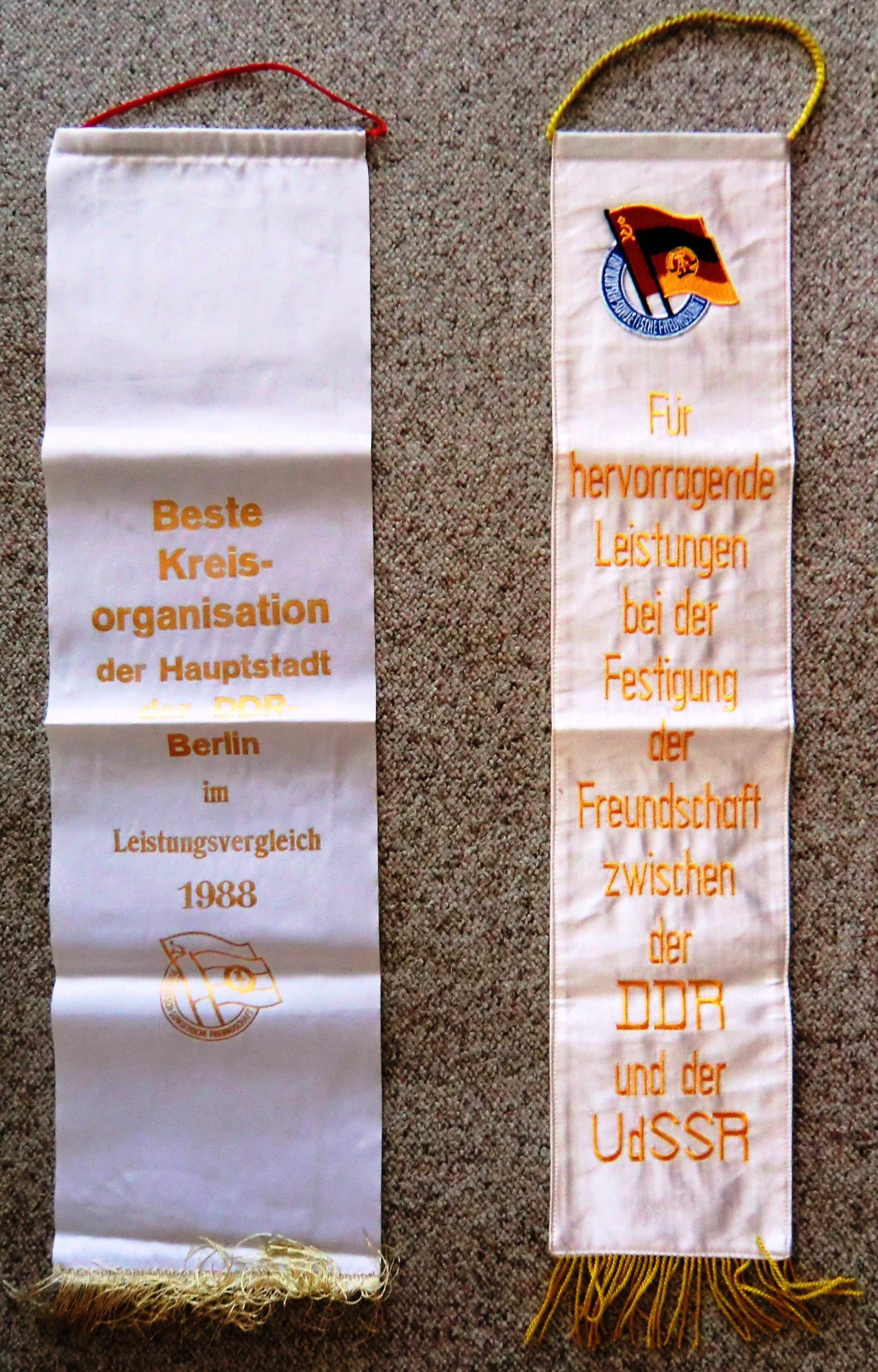 Ehrenschleifen: Auszeichnungen für Kreisorganisationen der Gesellschaft für DSF. Diese Ehrenschleifen wurden durch den Zentralvorstand oder einen Bezirksvorstand vergeben und an die Fahnen der Kreisorganisation geheftet.